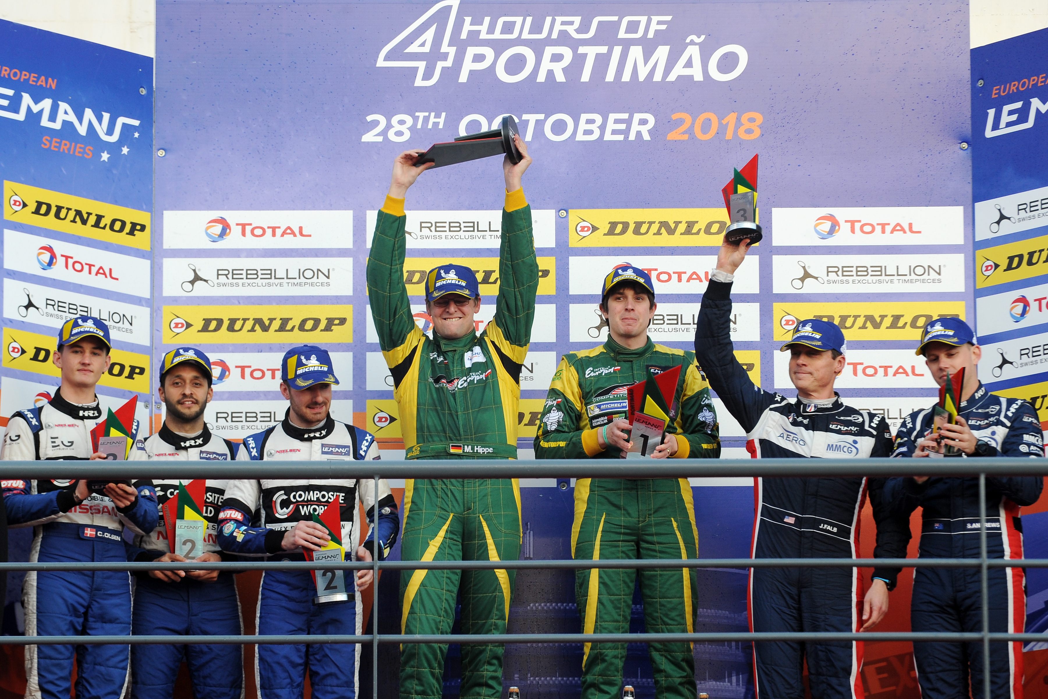 Podium de la catégorie LMP3 des 4 Heures de Portimão 2018 avec Martin Hippe, Jakub Śmiechowski, Colin Noble, Alex Kapadia, Christian Olsen, John Falb et Scott Andrews